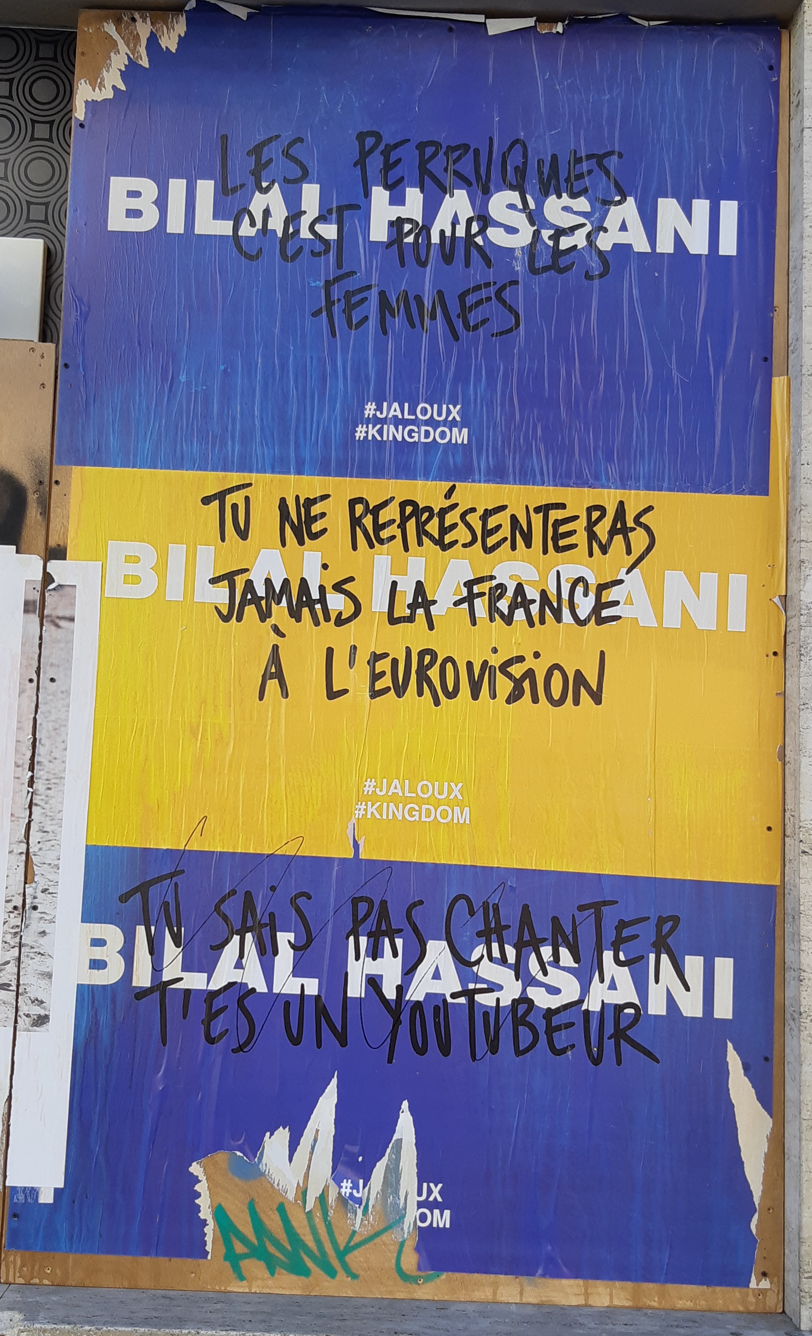 Affiches promotionnelles à Paris de Jaloux, single de Bilal Hassani sorti en 2019, extrait de son premier album Kingdom.